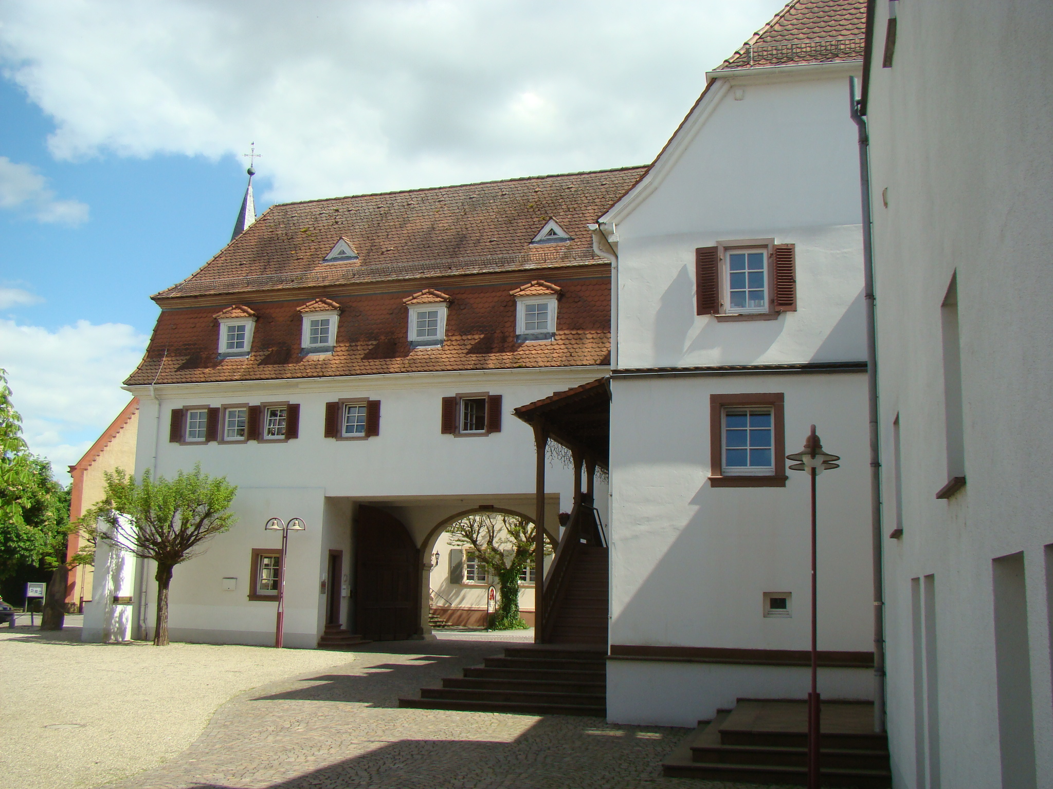 Helmstadt-Bargen, Ortsteil Helmstadt, Rathaus